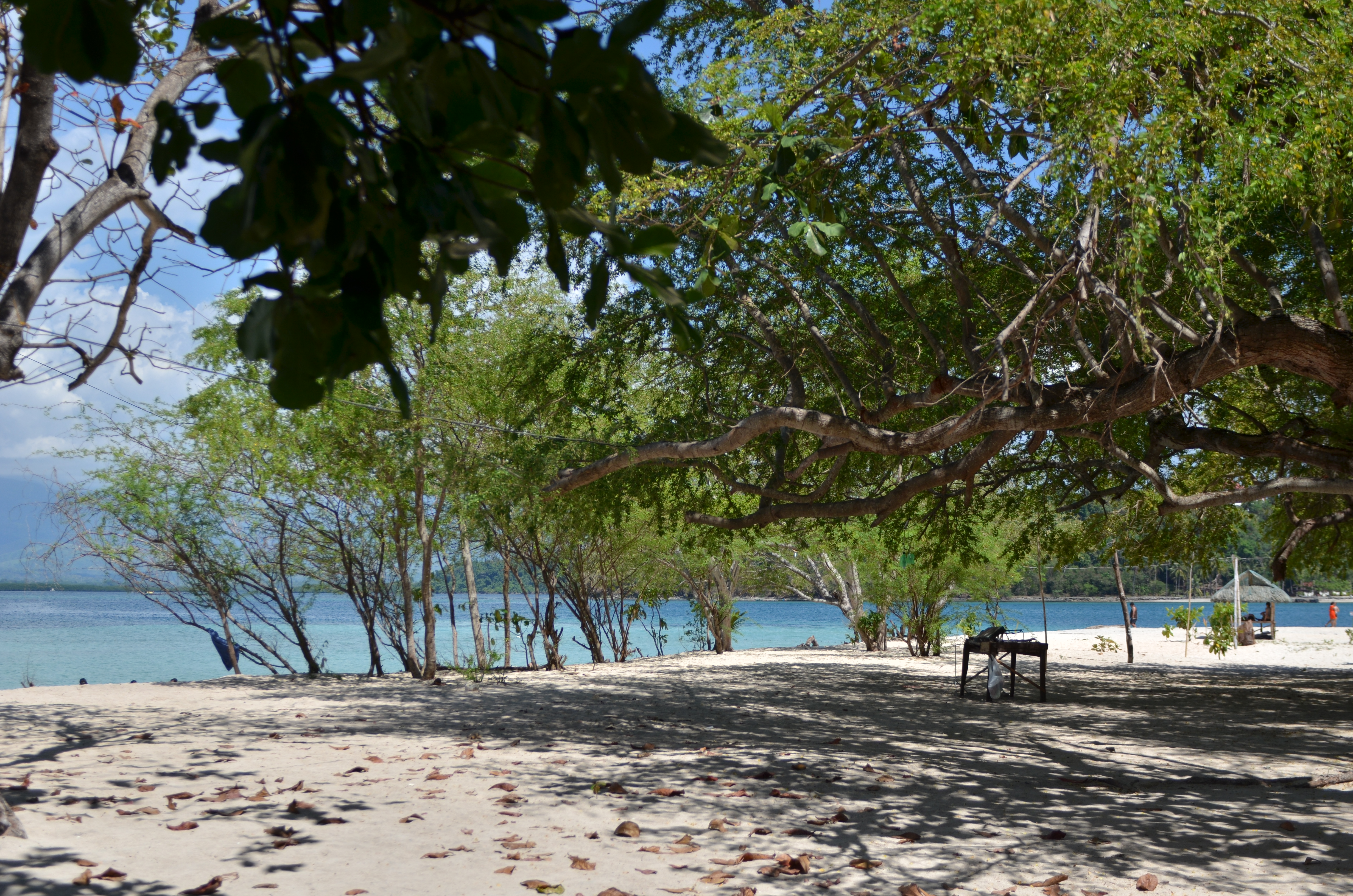 Magalawa Island